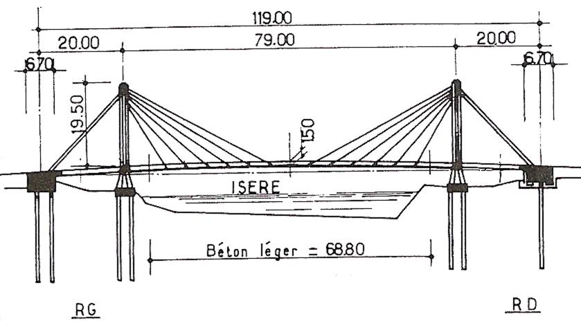 schéma d'ensemble de la passerelle